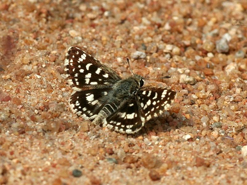 Spialia galba en , India